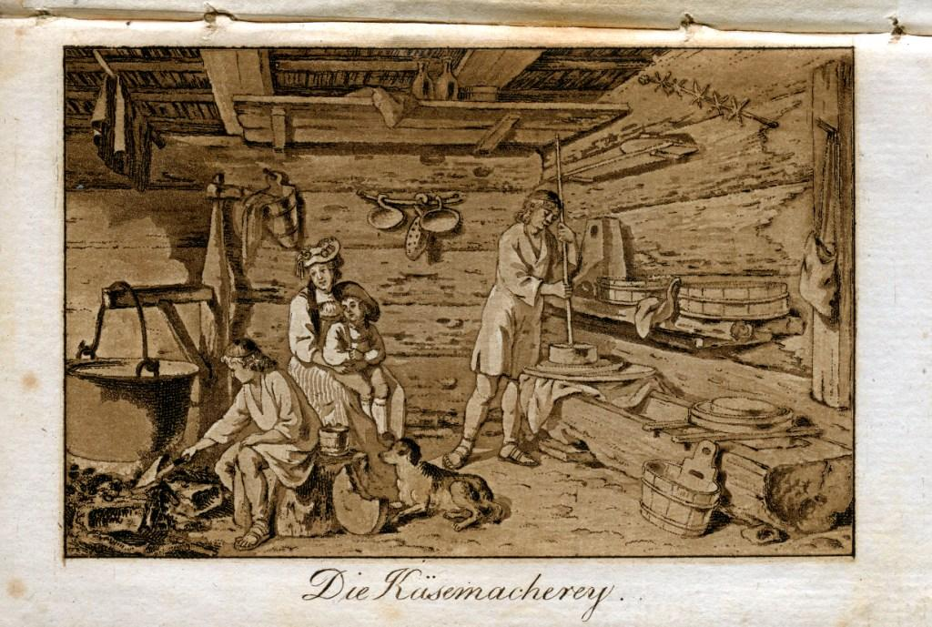 Aquatinta von Franz Nikolaus König, erschienen im Helvetischen Almanach 1805